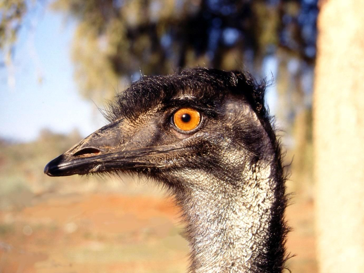 Emo (Dromaius novaehollandiae), Australia